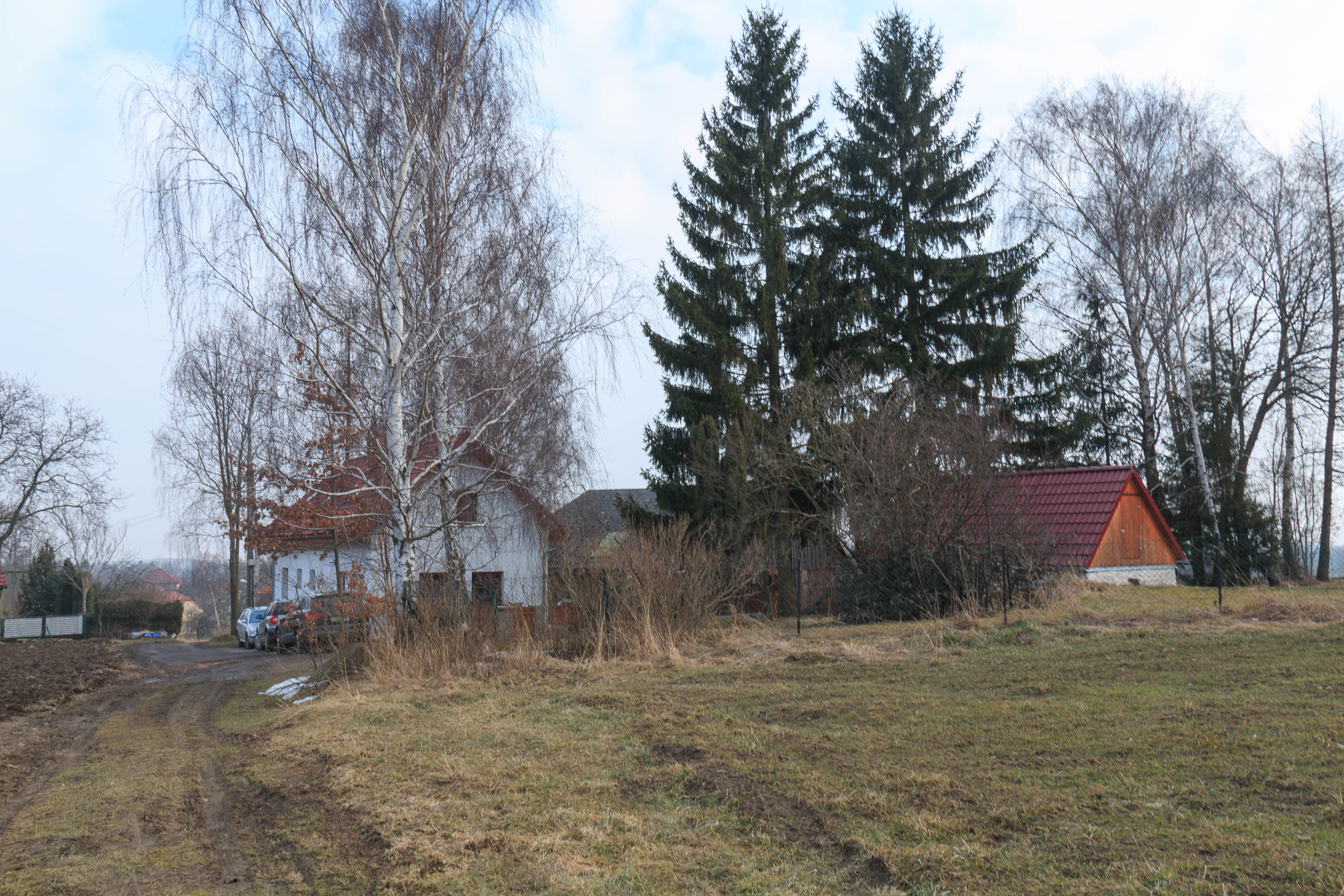 Březovec č. 1